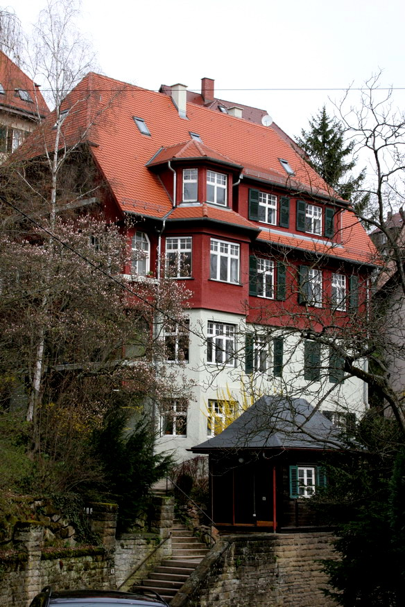 Bick auf 2 Schwarzwaldhäuser